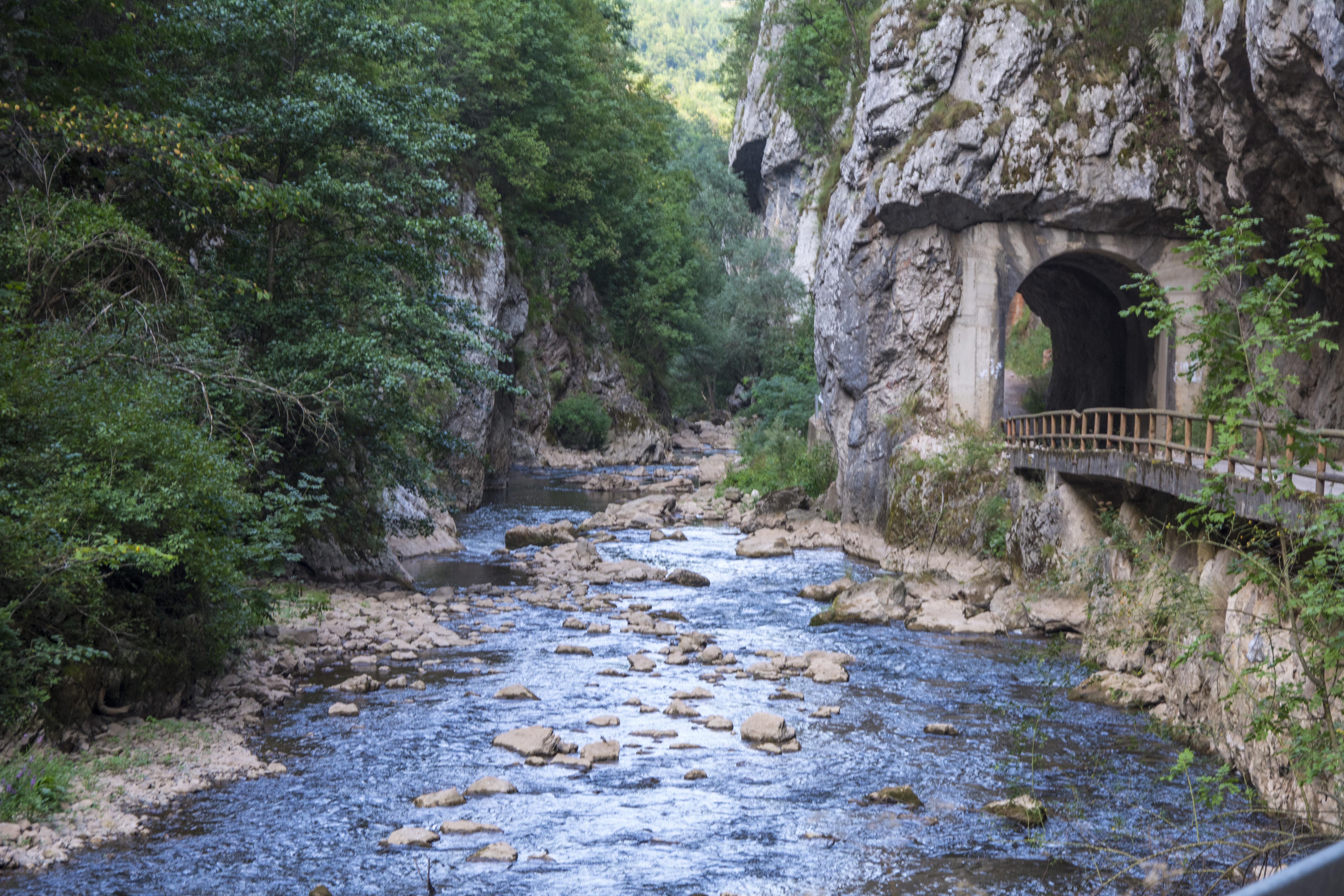 Put kroz kanjon Jerme